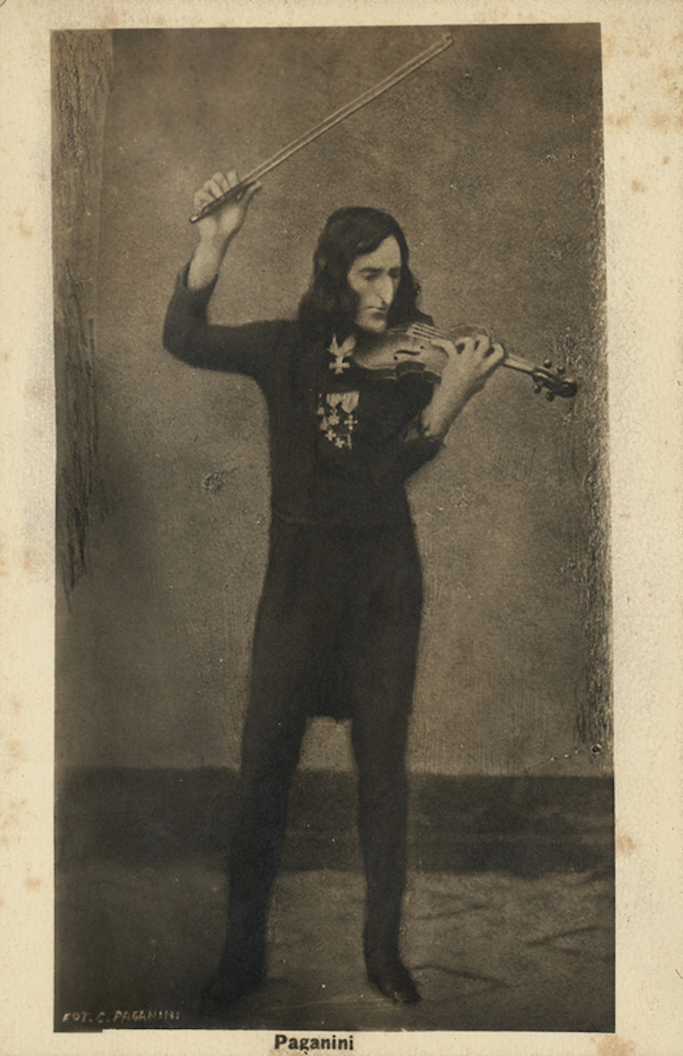 Nicolò Paganini 1782-1840 italienischer Violinist, Gitarrist und Komponist.